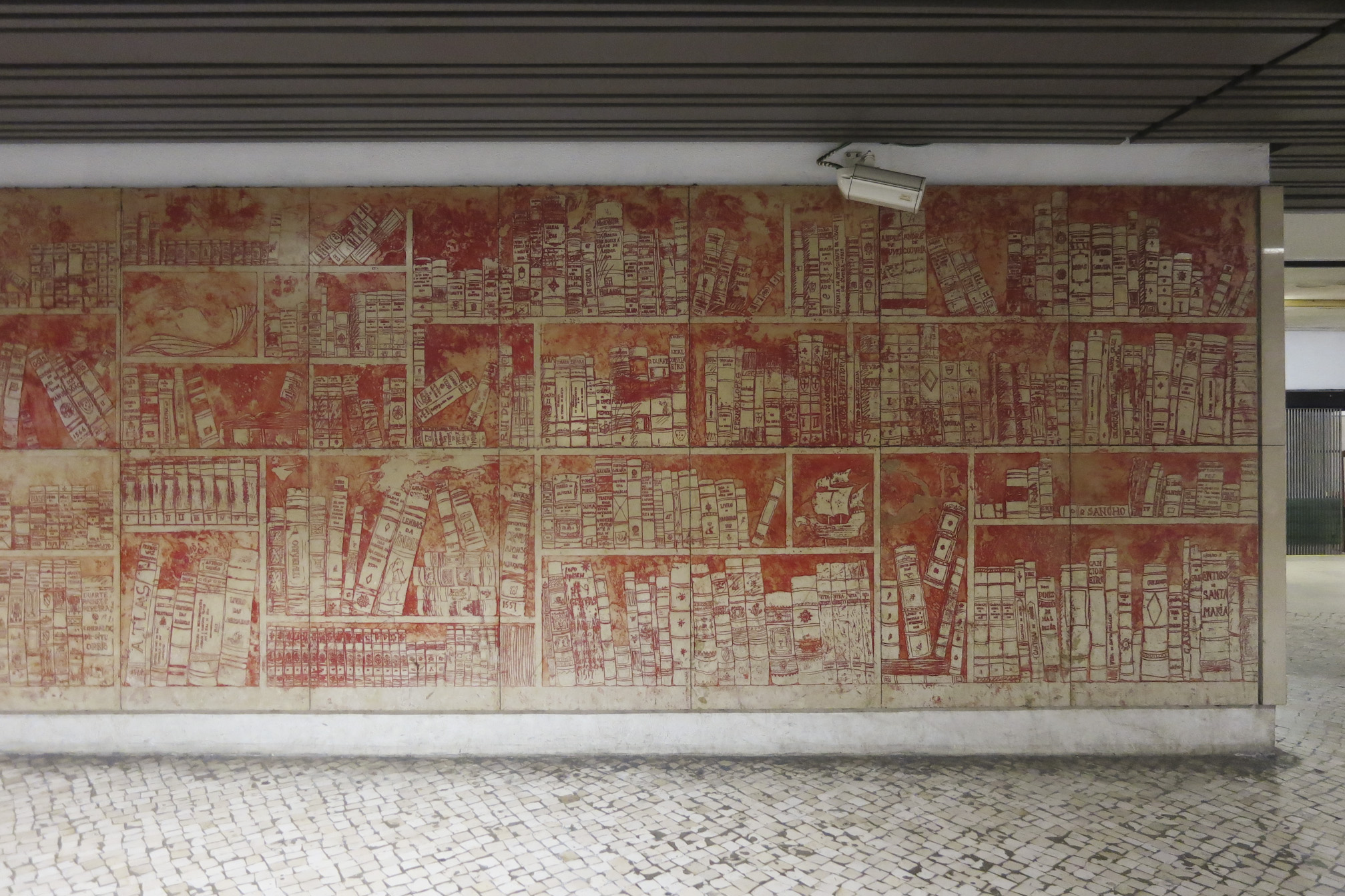 Bartolomeu dos Santos, painel em pedra gravada, Estação Entrecampos, Lisboa